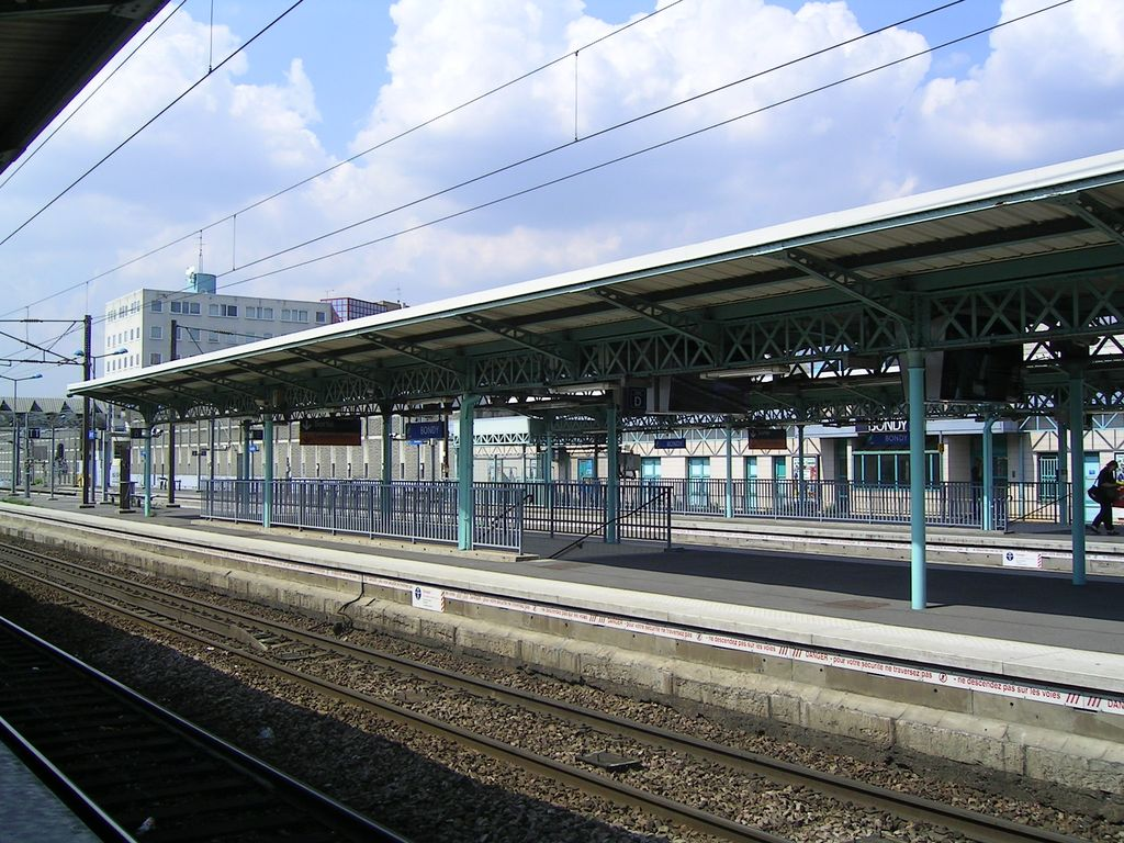 Gare et voie ferrée RER E Photo personnelle (own work) de Marianna